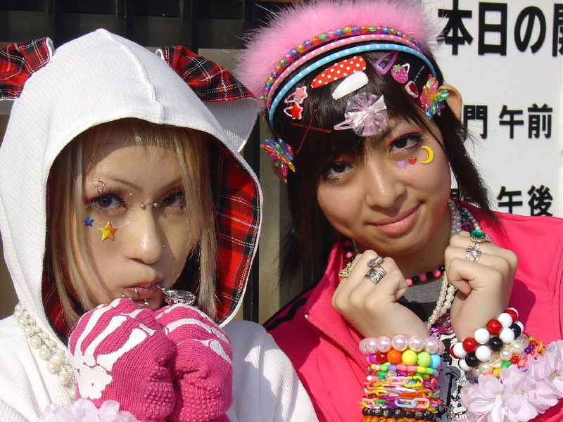 Harajuku girls